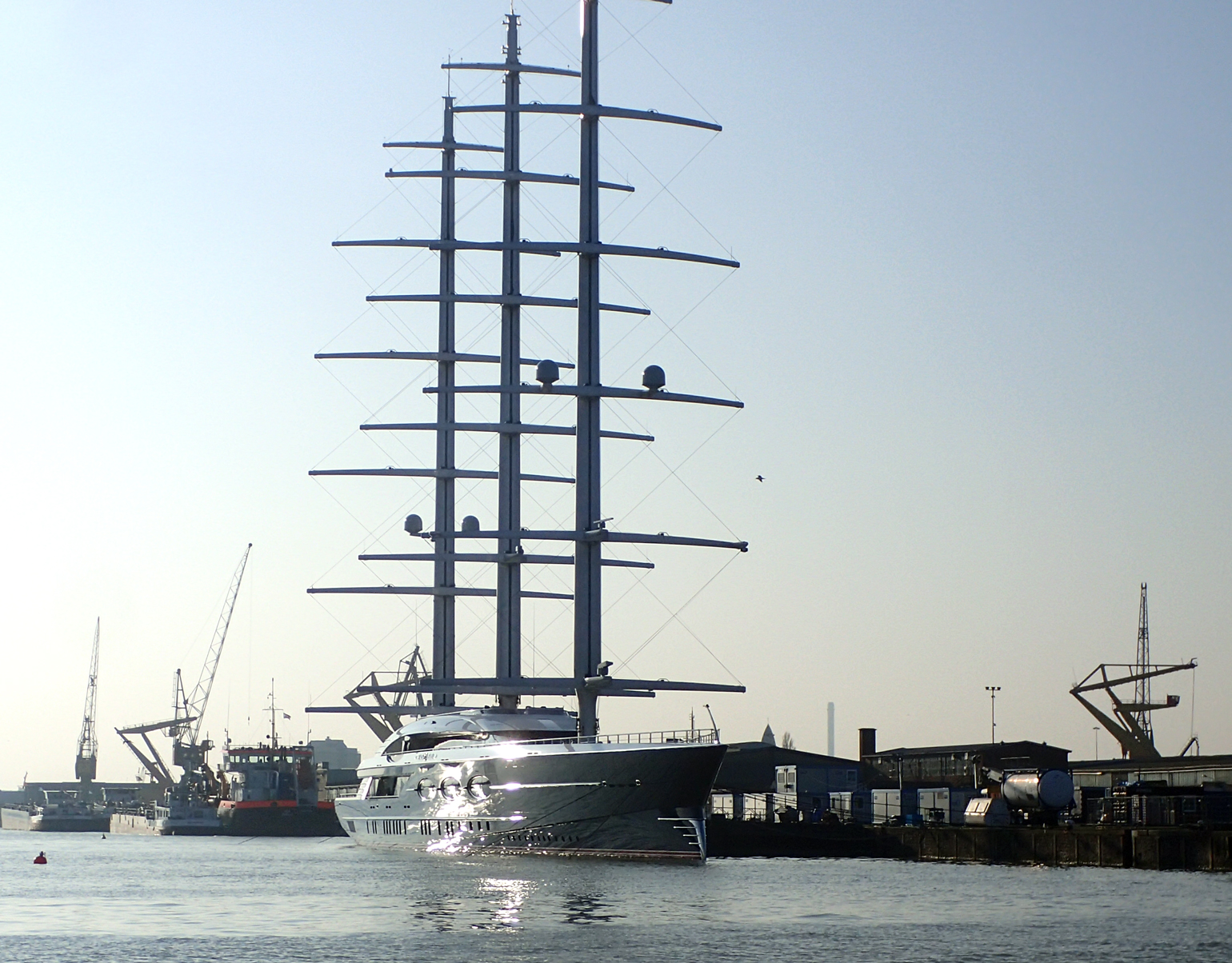 Mega Yacht Black Pearl in Rotterdam